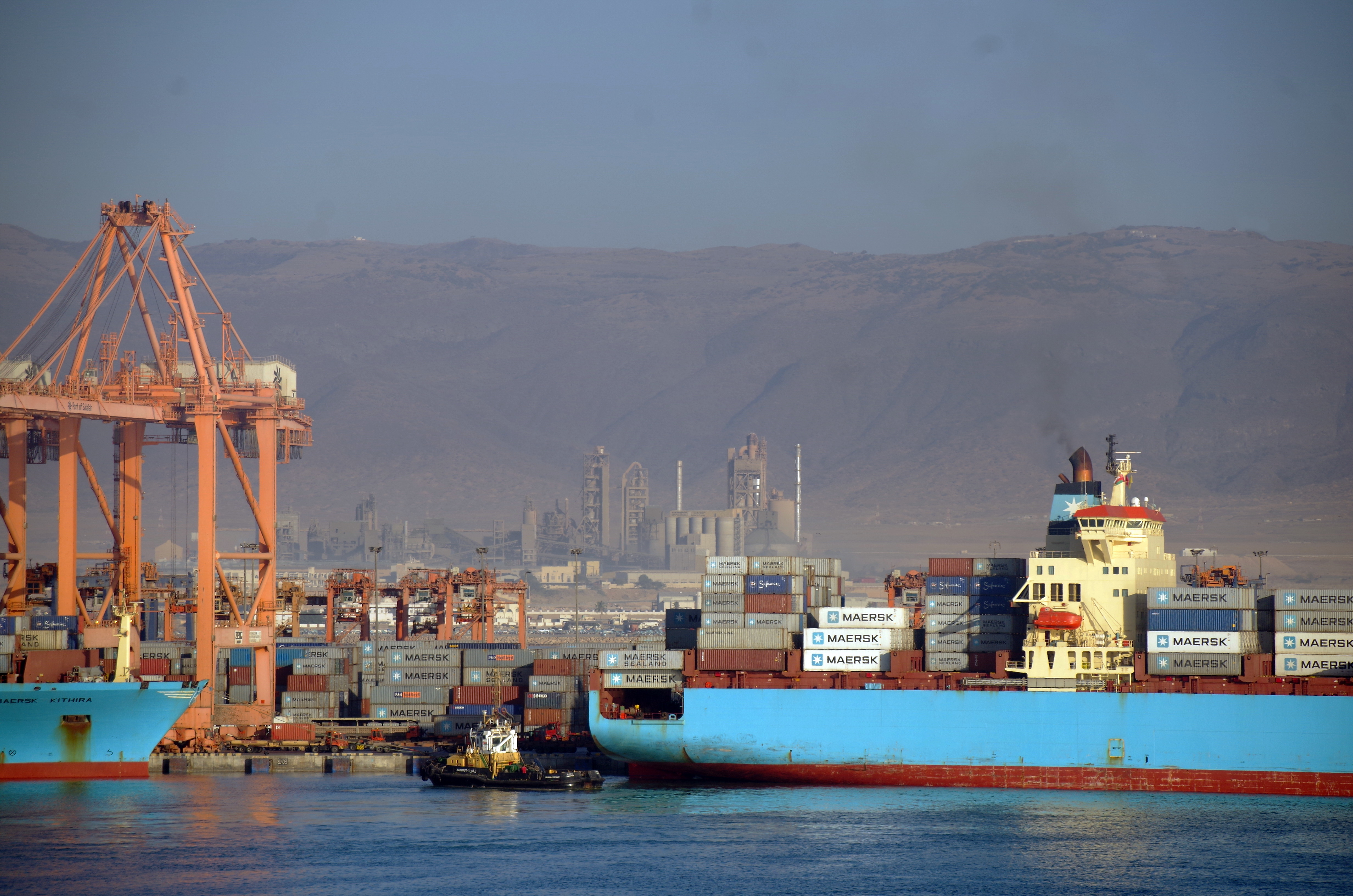 Salalah, Hafen und Zementwerk